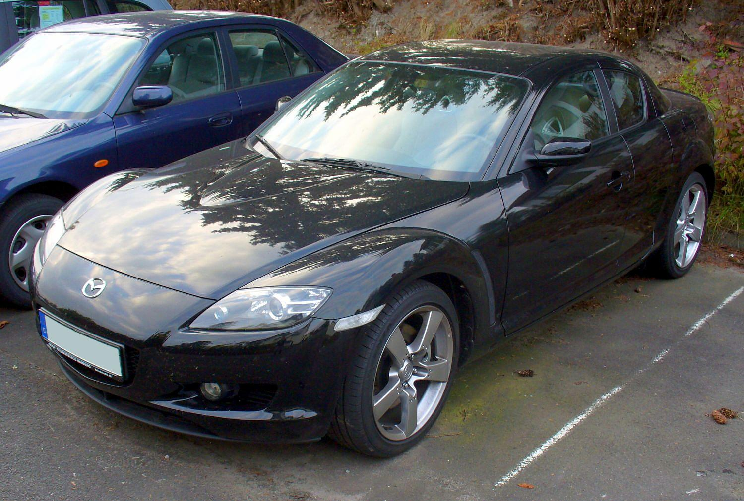 Mazda RX-8